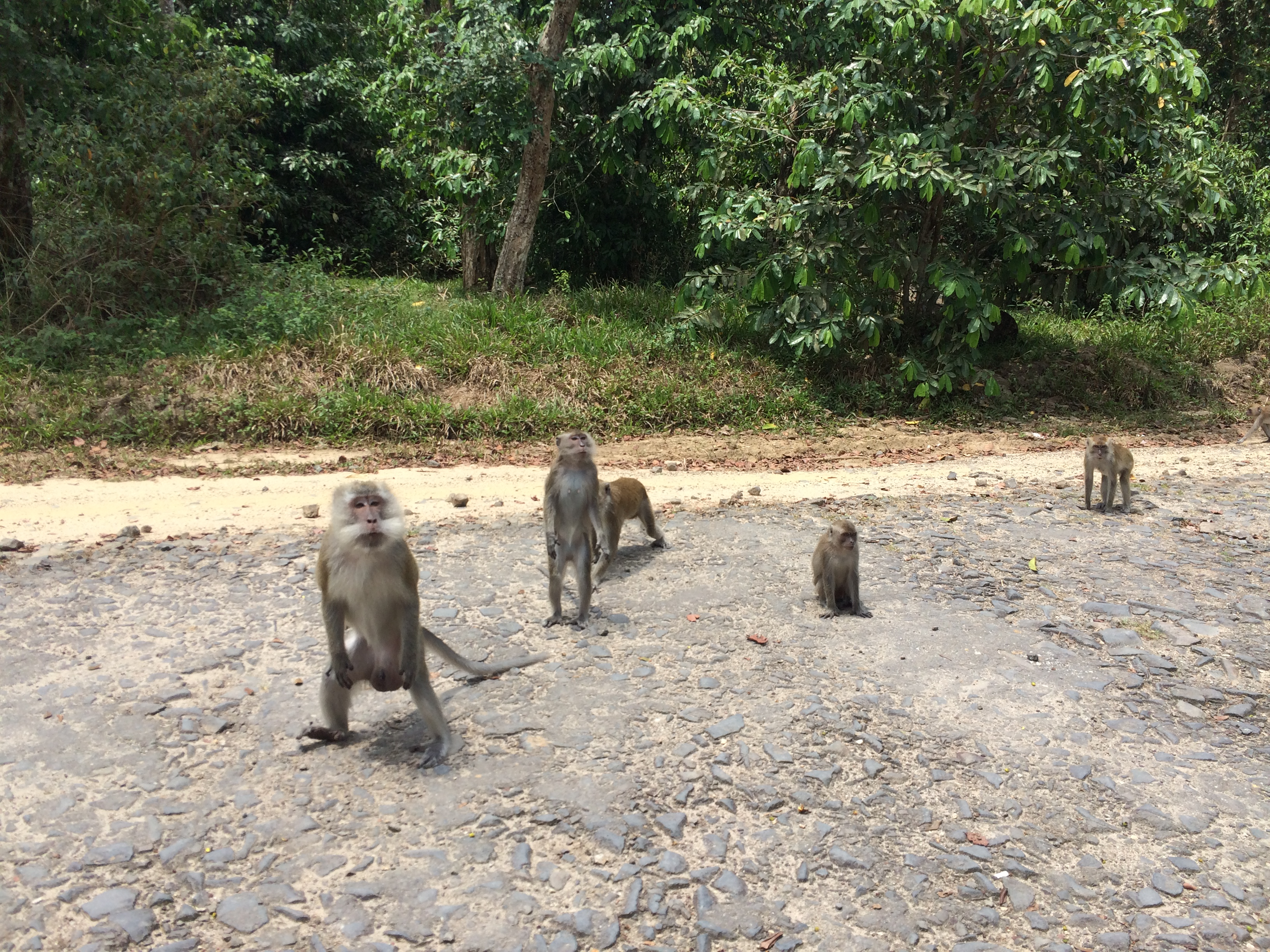 Way Kambas National Park